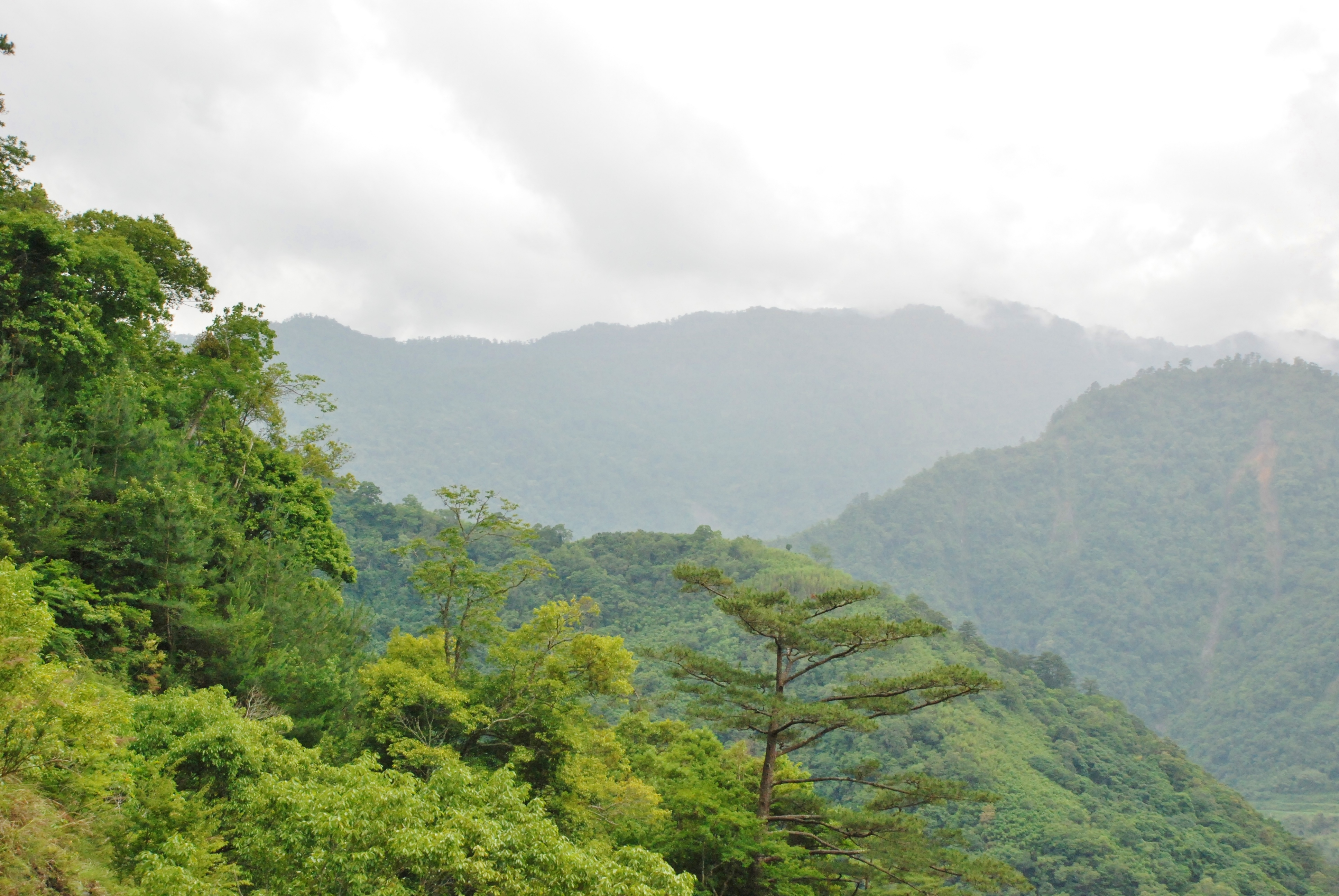 313, Taiwan, 新竹縣尖石鄉秀巒村